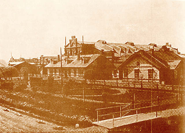 Великолукский локомотиворемонтный завод в 30-е годы